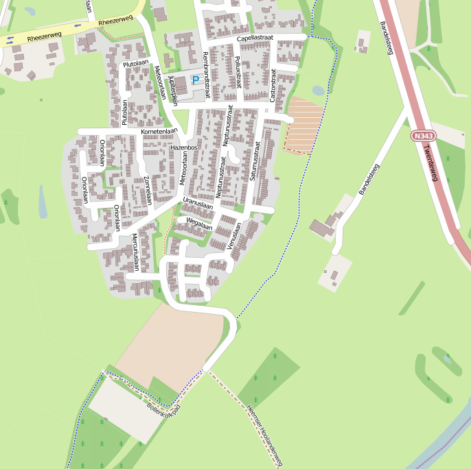 De wijk Hazenbos op . Onder aan de kaart het Hazenbos waar de wijk haar naam aan ontleent